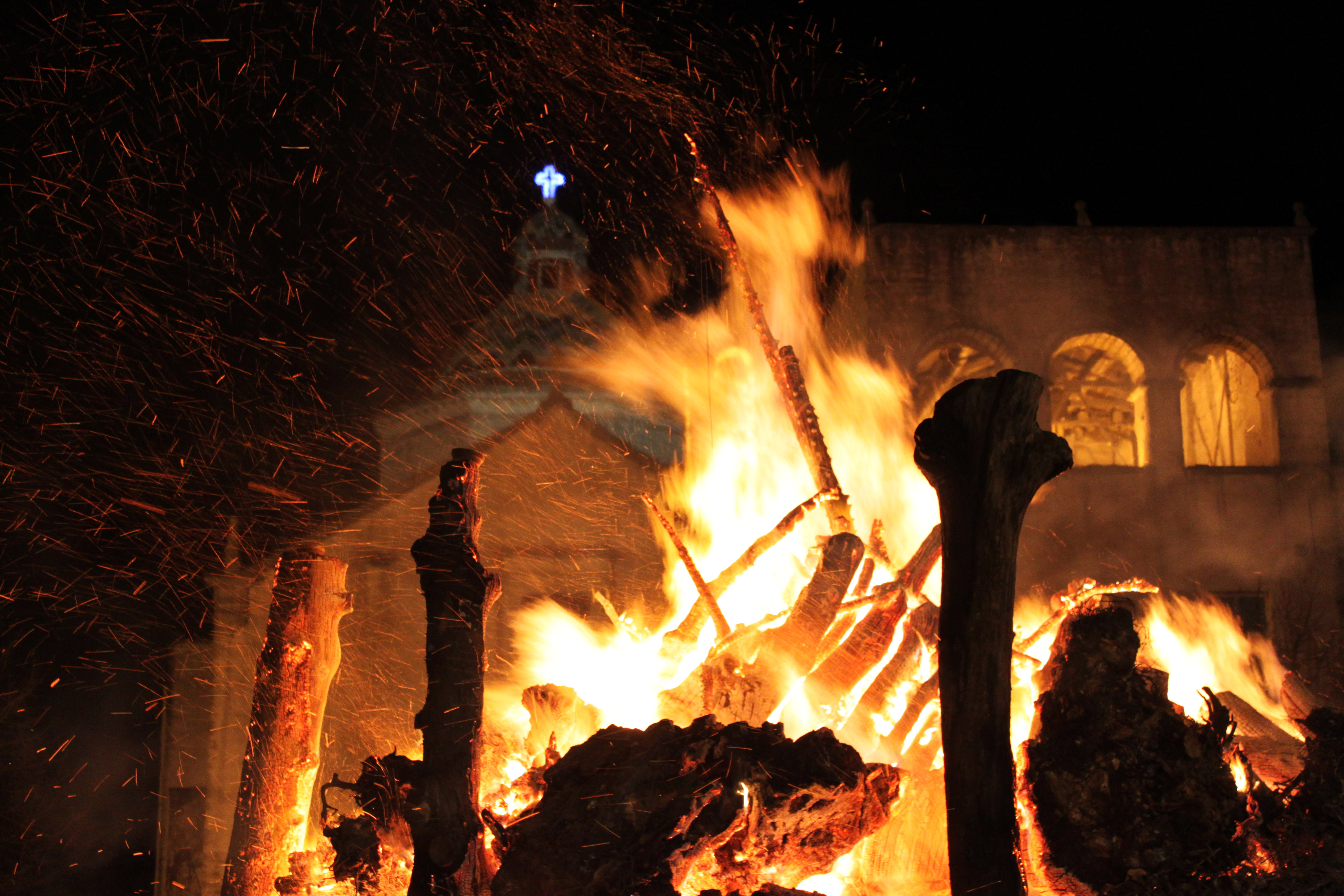 Fanòva allestita dinnanzi al Convento di Castellana Grotte (foto di Giandomenico Laera, 2011)